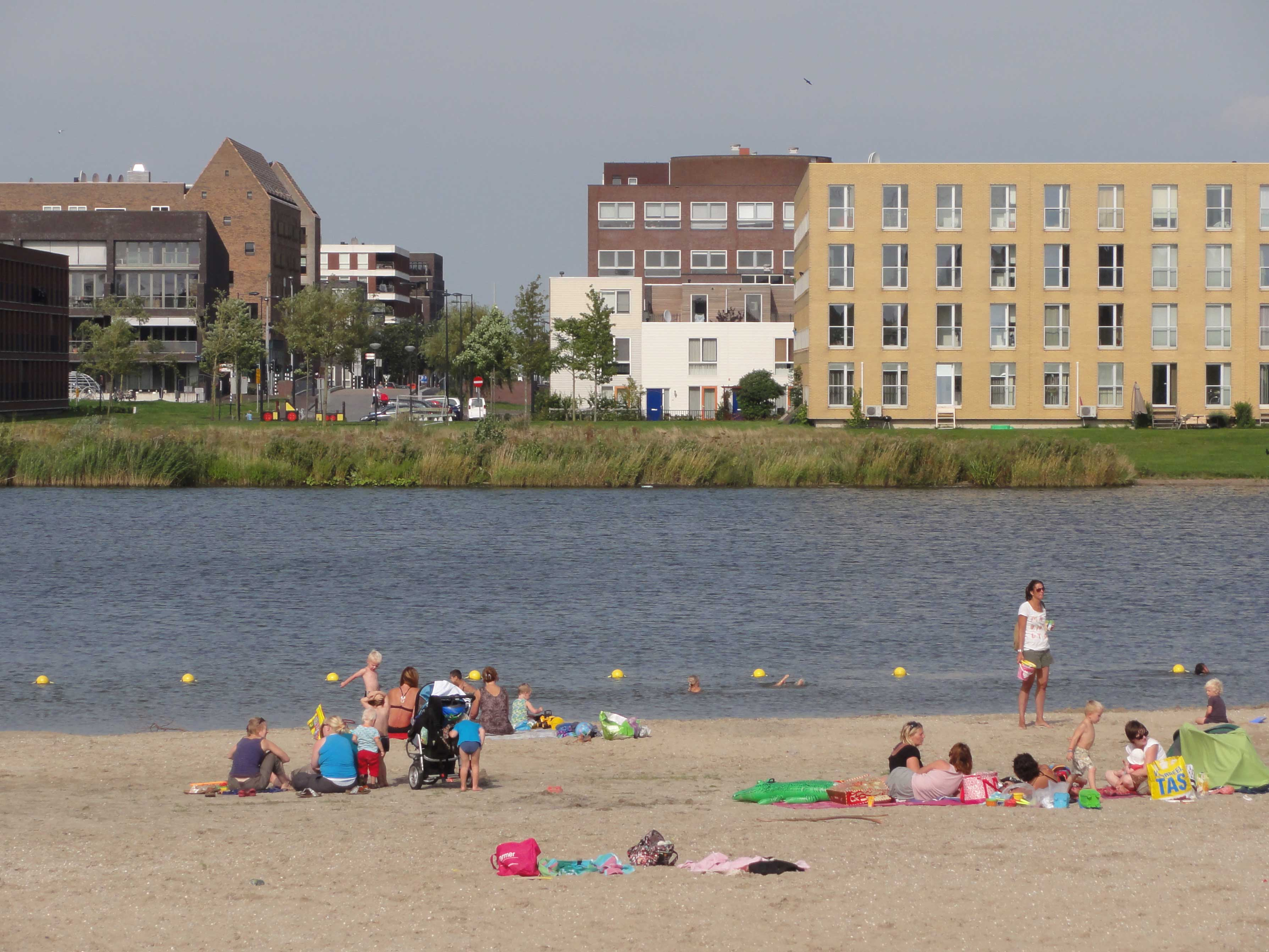 Strand Diemerpark met zicht op IJburg